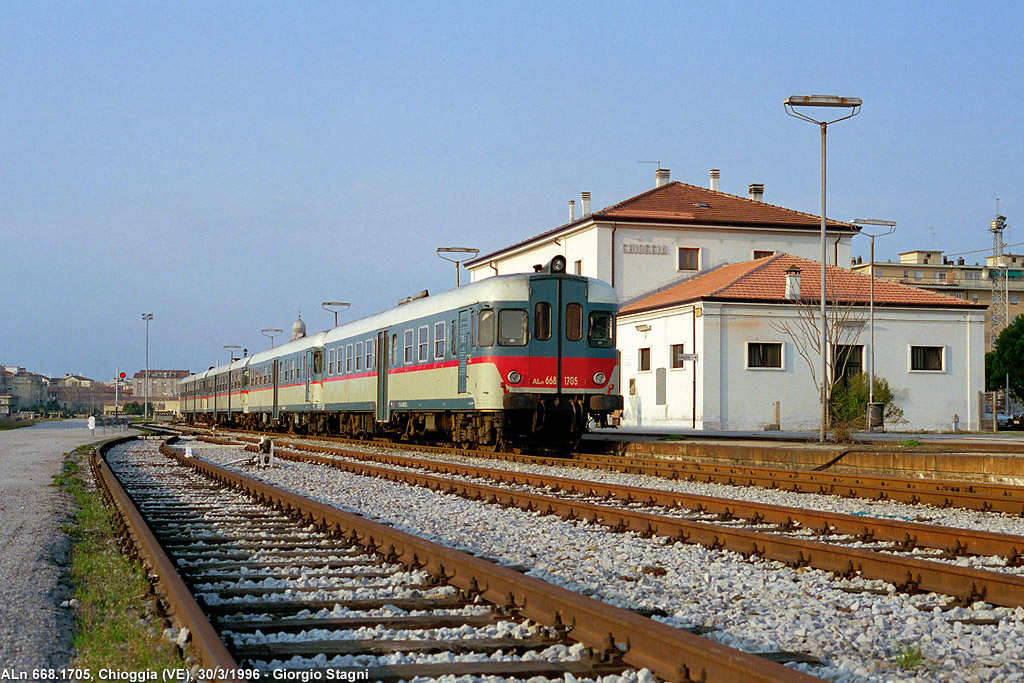 Stazione ferroviaria di Chioggia.